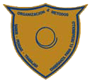 Logo de la Universidad Dominicana O&M